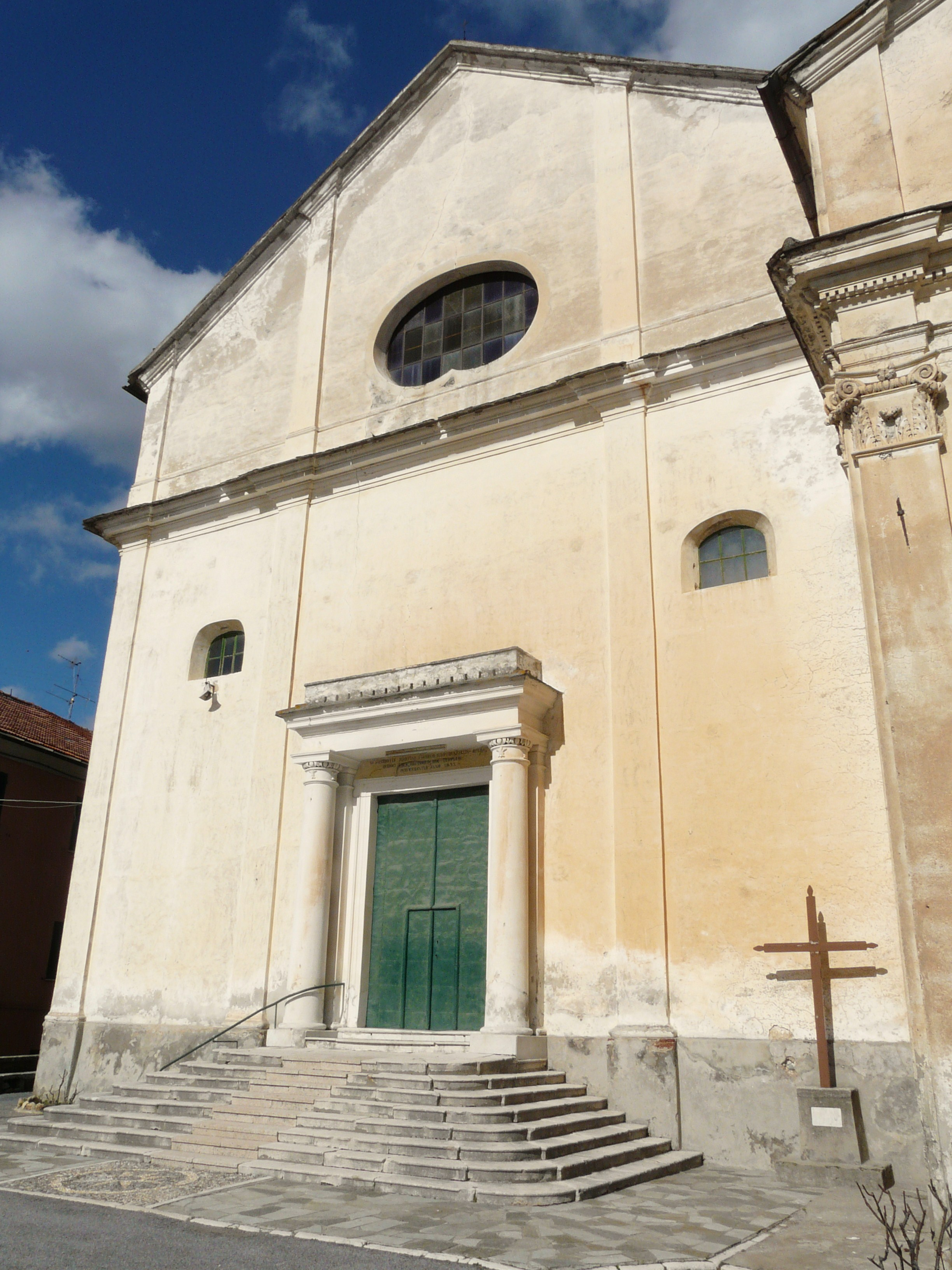 Chiesa di San Lorenzo di Feglino, Orco Feglino, Liguria, Italia